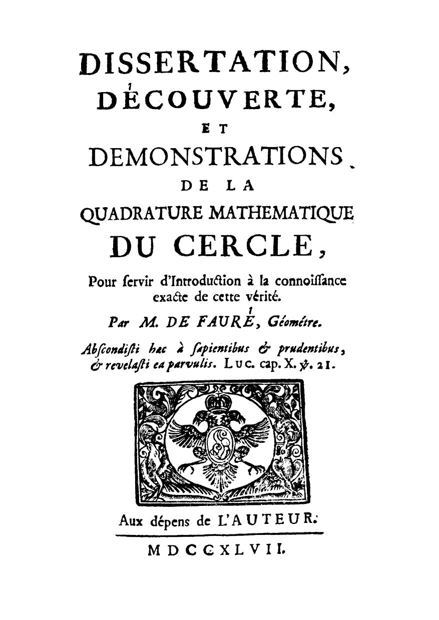 Dissertation, découverte, et demonstrations de la quadrature mathematique du cercle, pour servir d'introduction à la connoissance exacte de cette vérité. par m. de Fauré géométre. .... - A Genéve : aux dépens de l'Auteur, 1747. - 52 p. : ill. ; 8º .